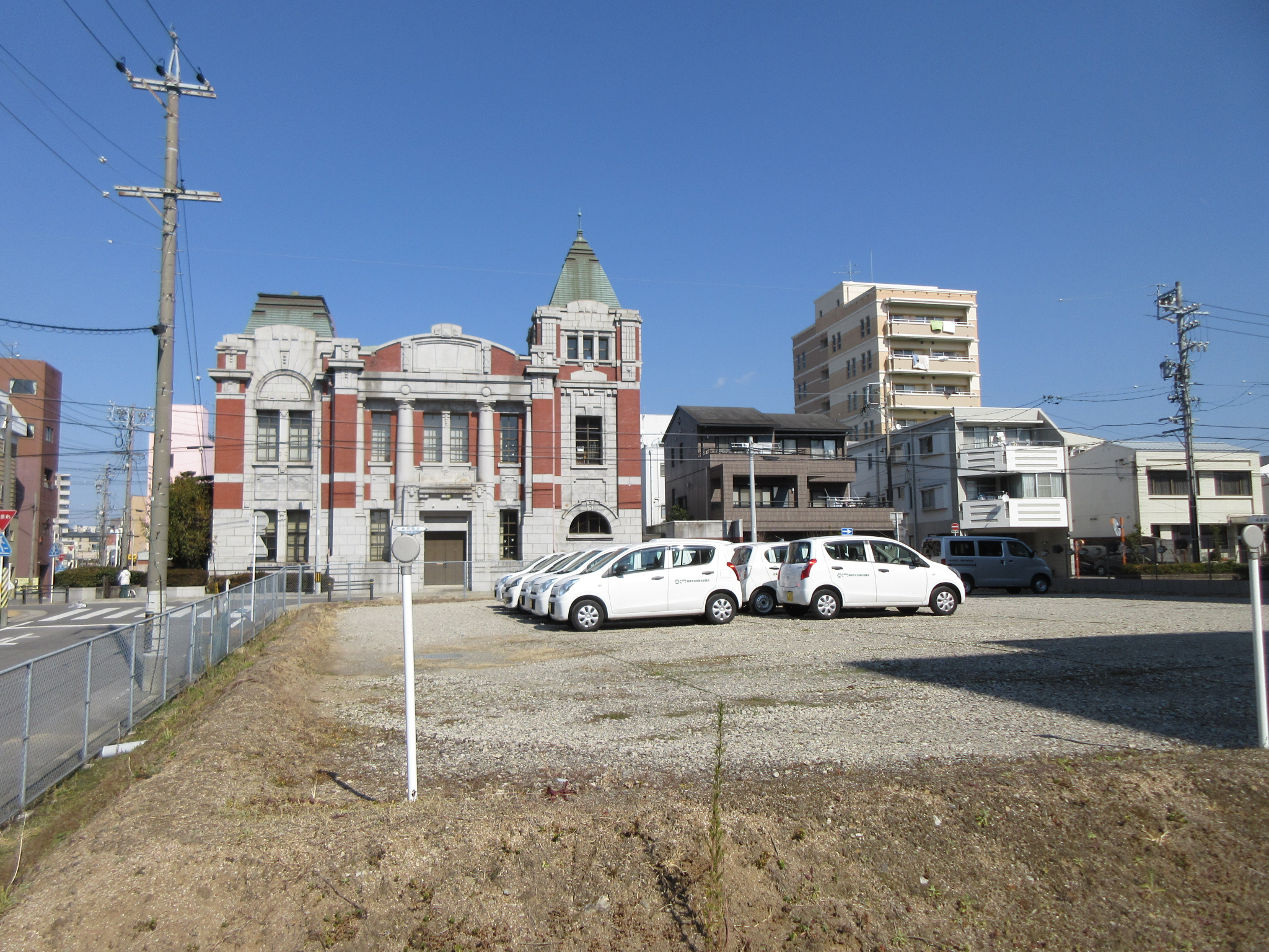 御馳走屋敷跡地。2007年までは「伝馬公設市場」があった。現在は 岡崎市社会福祉協議会の駐車場として使用されている。